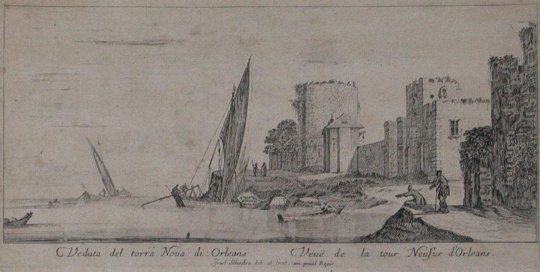 Vue de la tour Neuve d'Orléans, eau forte et burin Musée de la Marine de Loire, Châteauneuf-sur-Loire, Loiret, France